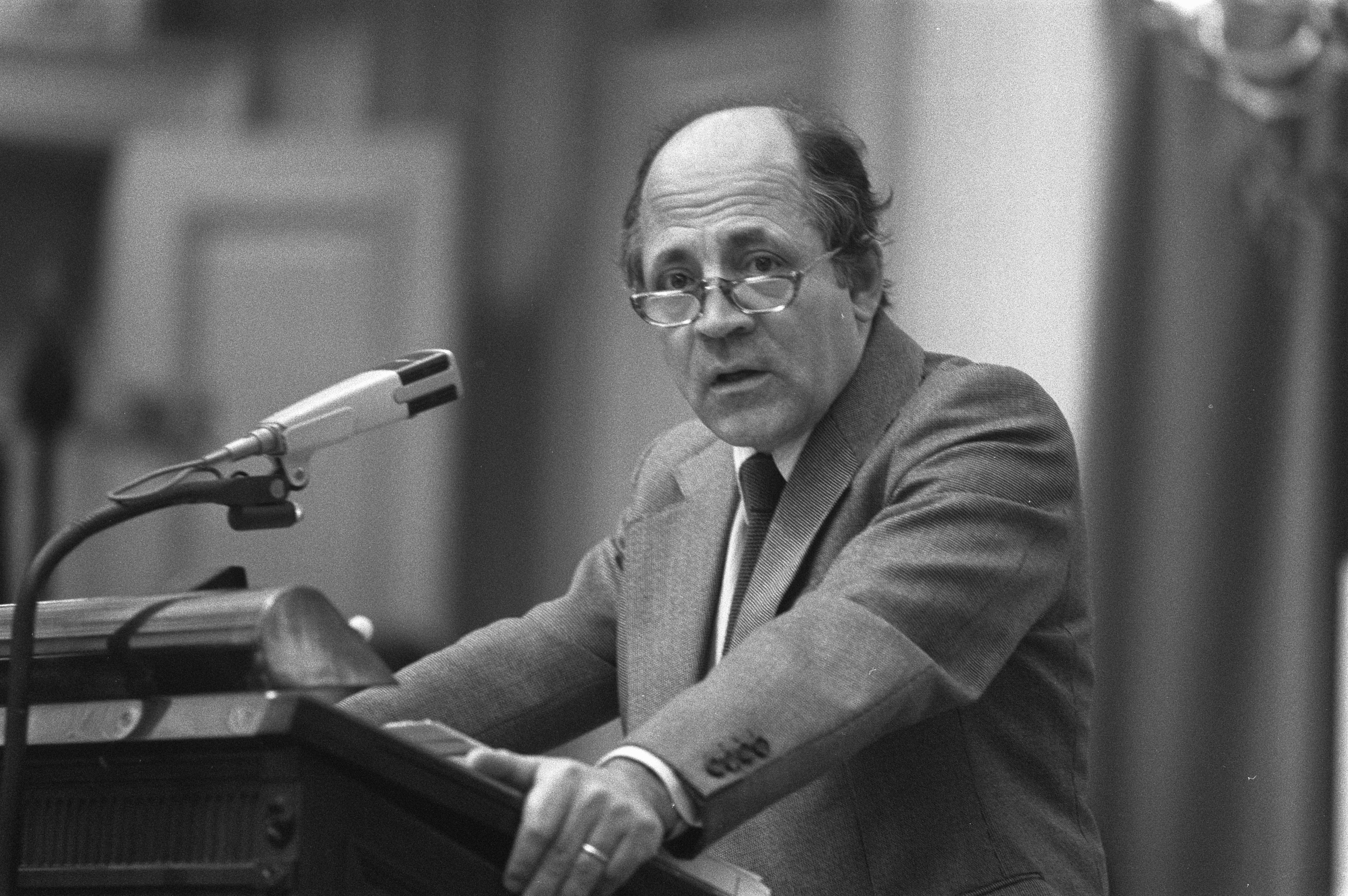 Collectie / Archief : Fotocollectie Anefo Reportage / Serie : Tweede Kamer Beschrijving : Waltmans (PPR) aan het woord Datum : 3 december 1981 Locatie : Den Haag, Zuid-Holland Trefwoorden : parlementariërs, portretten Persoonsnaam : Waltmans, H.J.G Fotograaf : Croes, Rob C. / Anefo Auteursrechthebbende : Nationaal Archief Materiaalsoort : Negatief (zwart/wit) Nummer archiefinventaris : bekijk toegang 2.24.01.05 Bestanddeelnummer : 931-8416